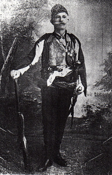 Redni Broj: 0626. Из Србије: Коле Рашић, војвода нишки. фотографија. 1876, pred objavljivanje rata Turskoj nastaju prva zvanična pravila koja će se primenjivati na četničke odrede, kao neku vrstu specijalnih jedinica. Spremajući se za rat, Srbija je u neoslobođene krajeve slala obučene gerilce, kako bi kasnije napredovanje vojske bilo lakše. Ovde nailazimo na sličnost sa uskocima, koji su imali slične zadatke i ciljeve. Prvi četnički vojvoda(turcizam harambaša biva zamenjen slovenskom rečju vojvoda nastalom od glagola vojevati) bio je niški trgovac Nikola Kole Rašić. On je rukovodio četama između Niša i Leskovca, a sam je obrazovao četu od oko 300 ljudi. Njegov zadatak je bio da probije put vojsci i olakša dalje prodiranje na jug. Vojvoda Kole je, u Drugom srpsko-turskom ratu prvi ušao u Leskovac i držao govor oslobođenom narodu. Todor Stanković Nišlija je među prvima organizovao četu koja kasnije ulazi u sastav Dobričkog odreda(pod komandom Miloša S. Milojevića). Toša Stanković će kasnije biti jedan od pregovarača u niškoj tvrđavi o predaji turske vojske. Tanasije Tasko Uzunović je treći istaknuti četnik, koji uspeva da pobegne iz niške tvrđave i priđe Koletu Rašiću, čiji je bio nerazdvojni prijatelj.